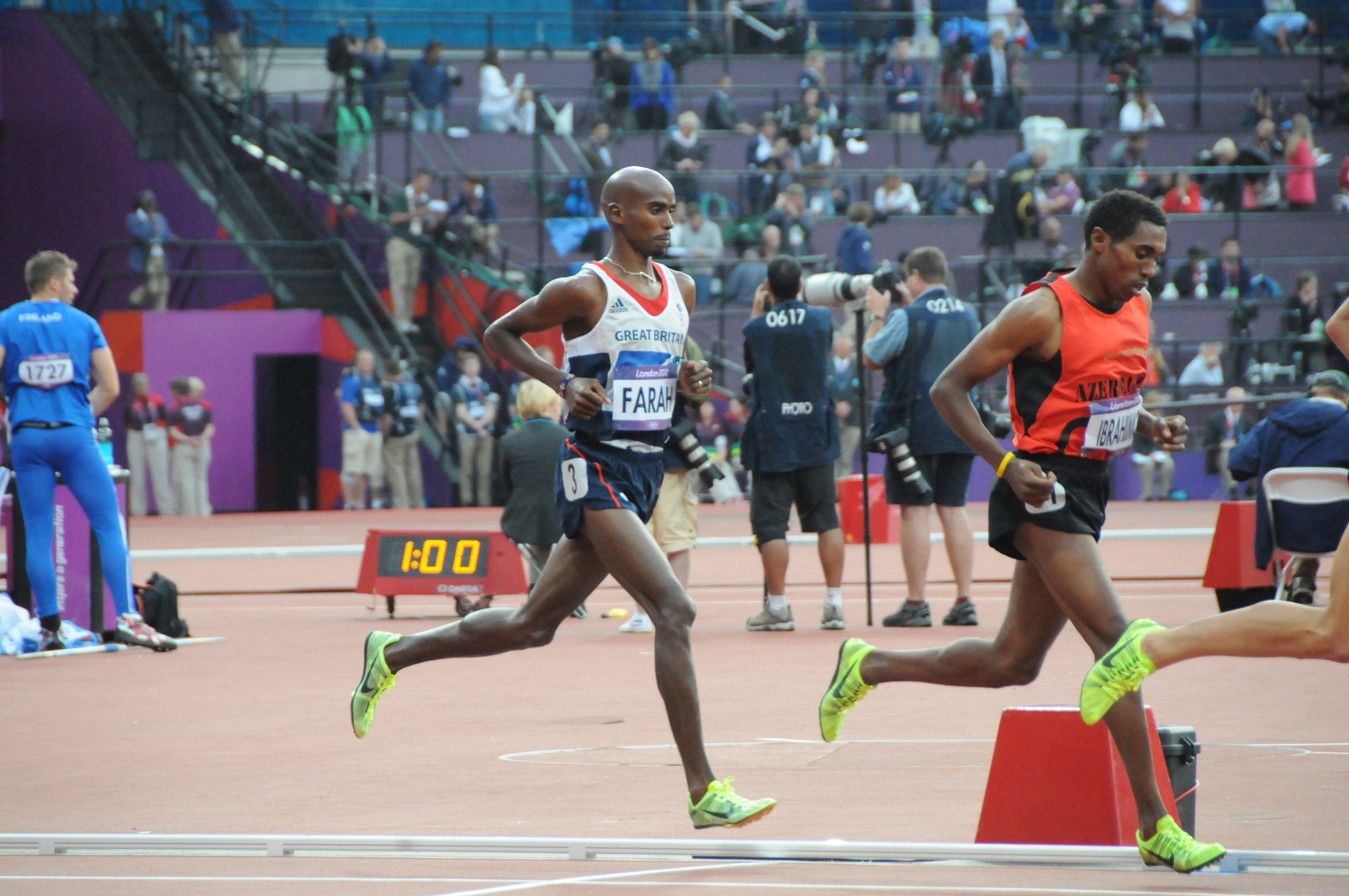 Course du 5000m des jeux olympique de Londres. On voit le coureur britanique Mo Farah vainqueur de la course.